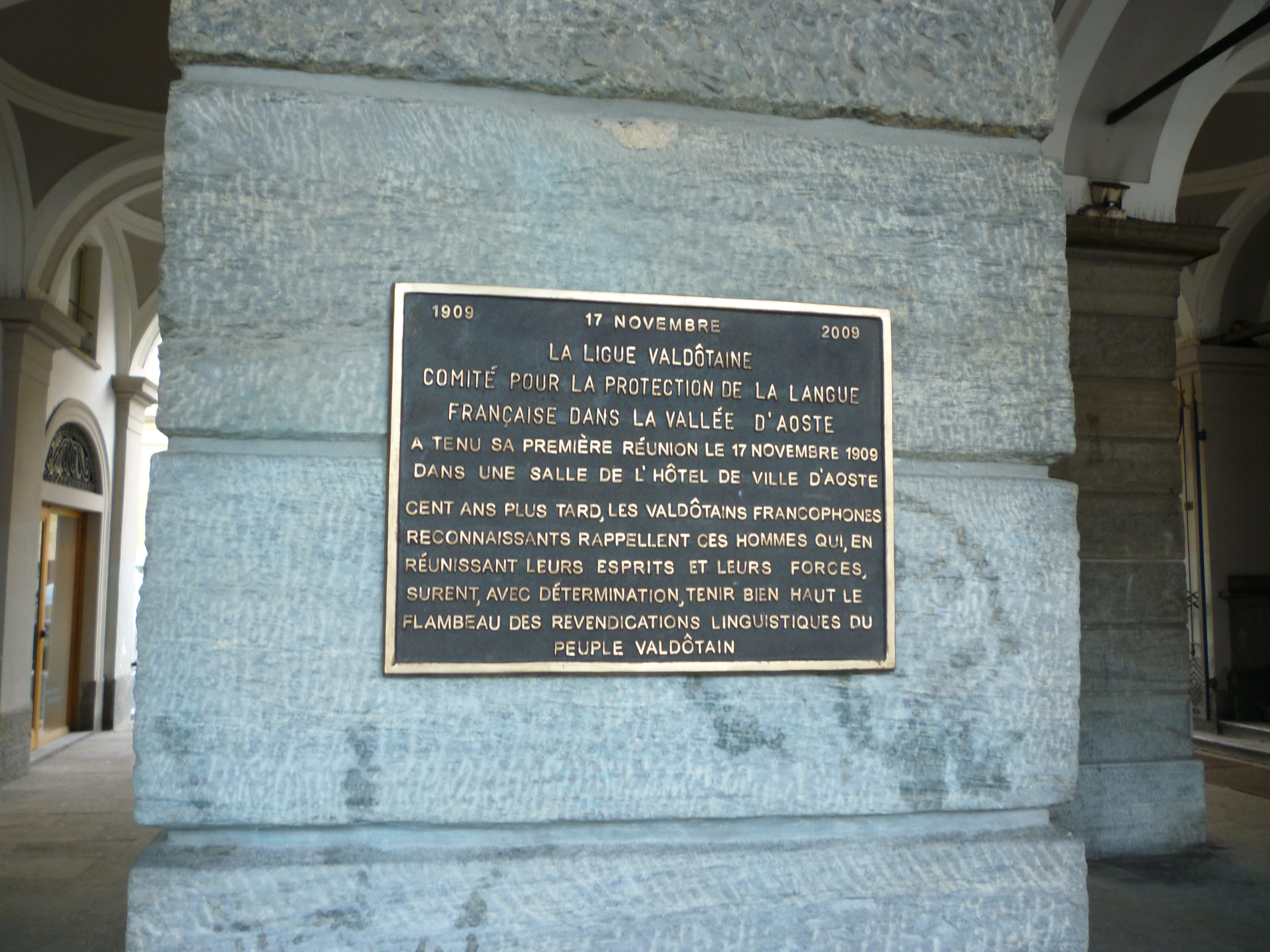 Plaque en mémoire du centenaire de la Ligue valdôtaine